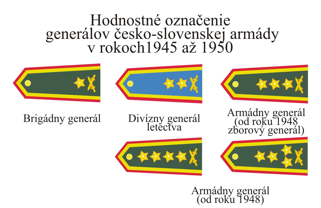 Hodnostné označenie generálov Česko-Slovenskej armády v rokoch 1945 až 1950